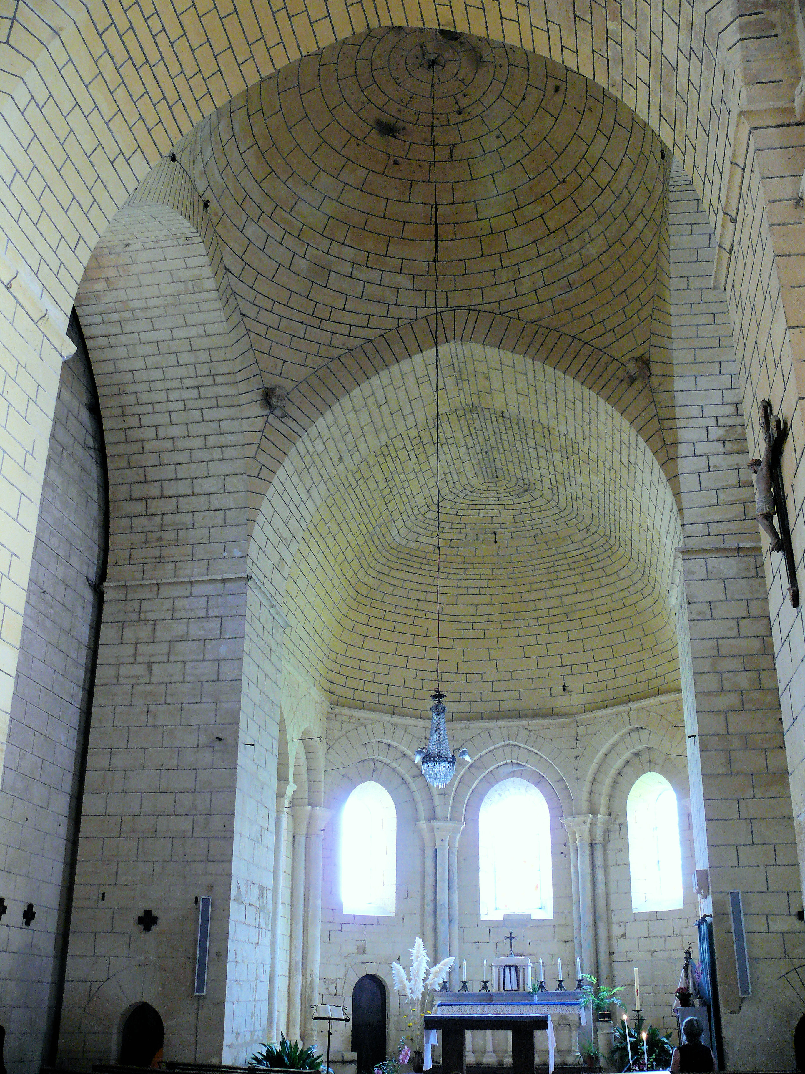 Sarlat-la-Canéda - Eglise Notre-Dame de la Nativité à Temniac